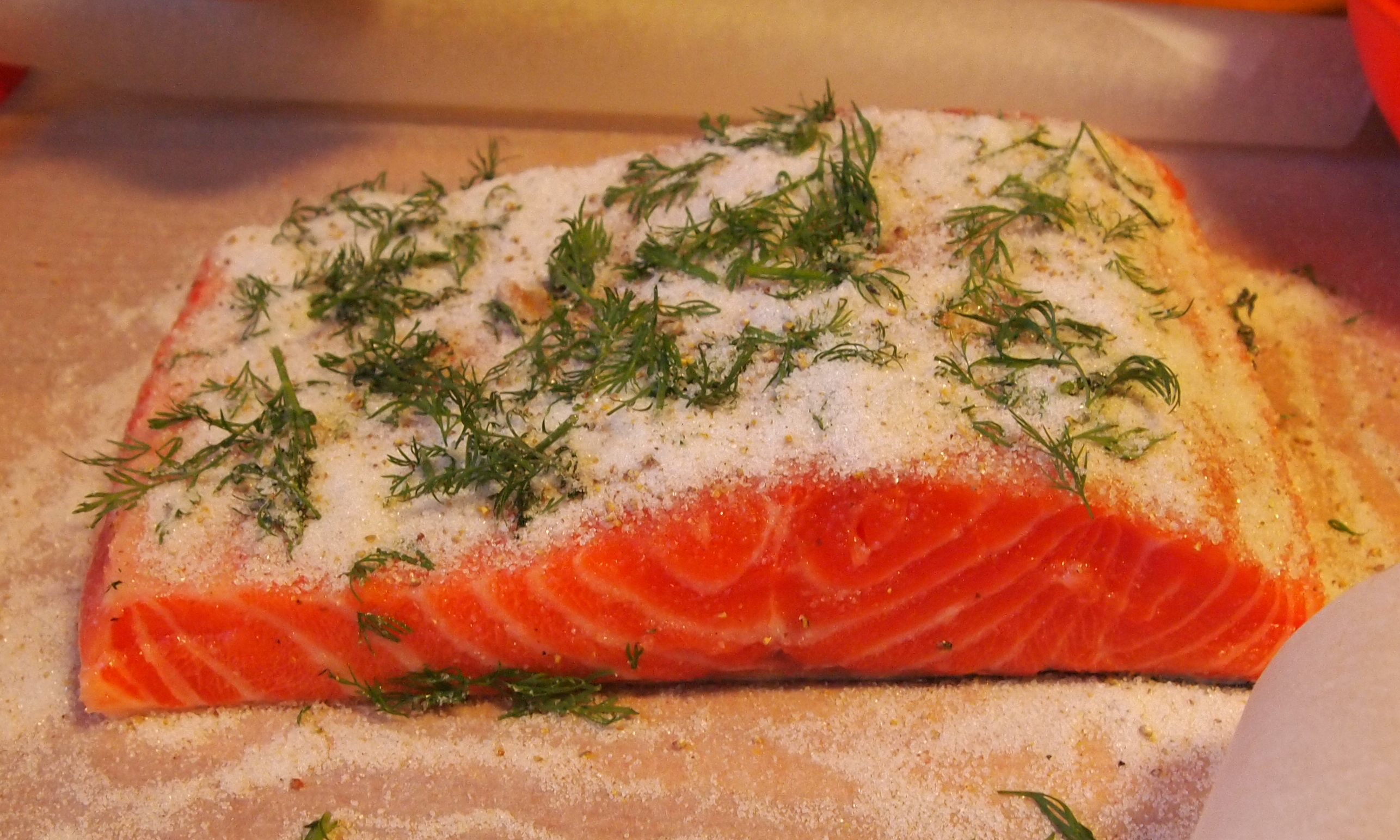 Curing salmon